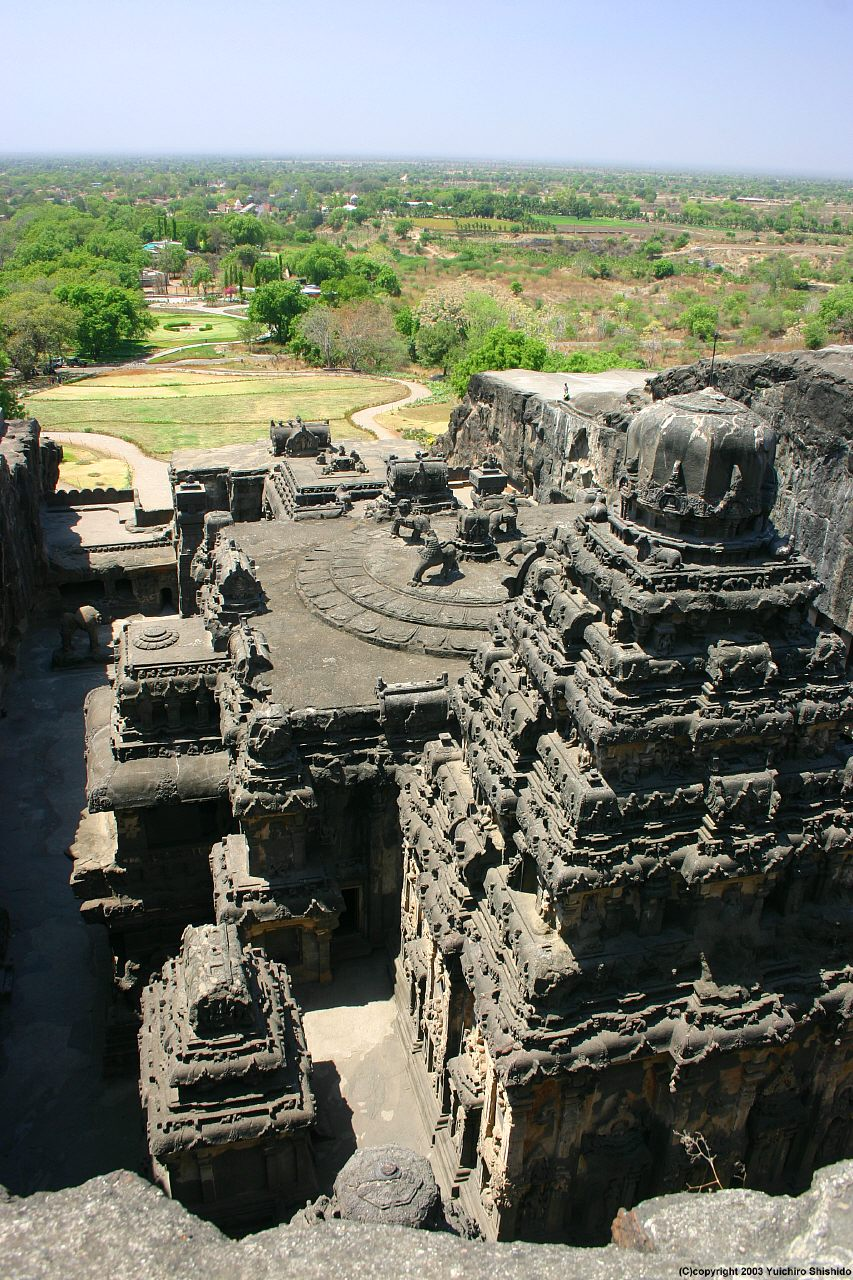 Ellora caves. Cave 16.